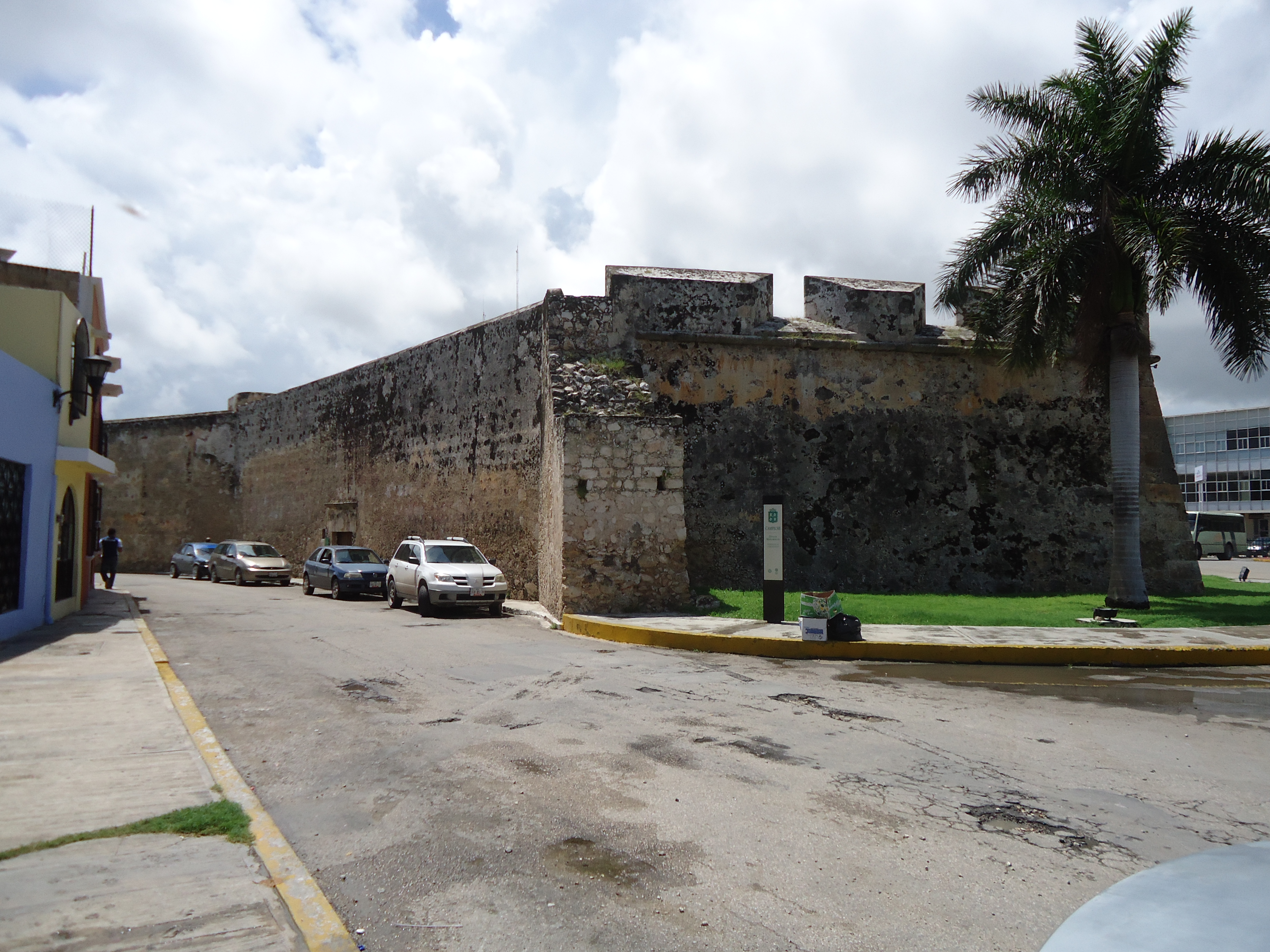 Fotografía del Baluarte de Juan, San Francisco de Campeche, Campeche